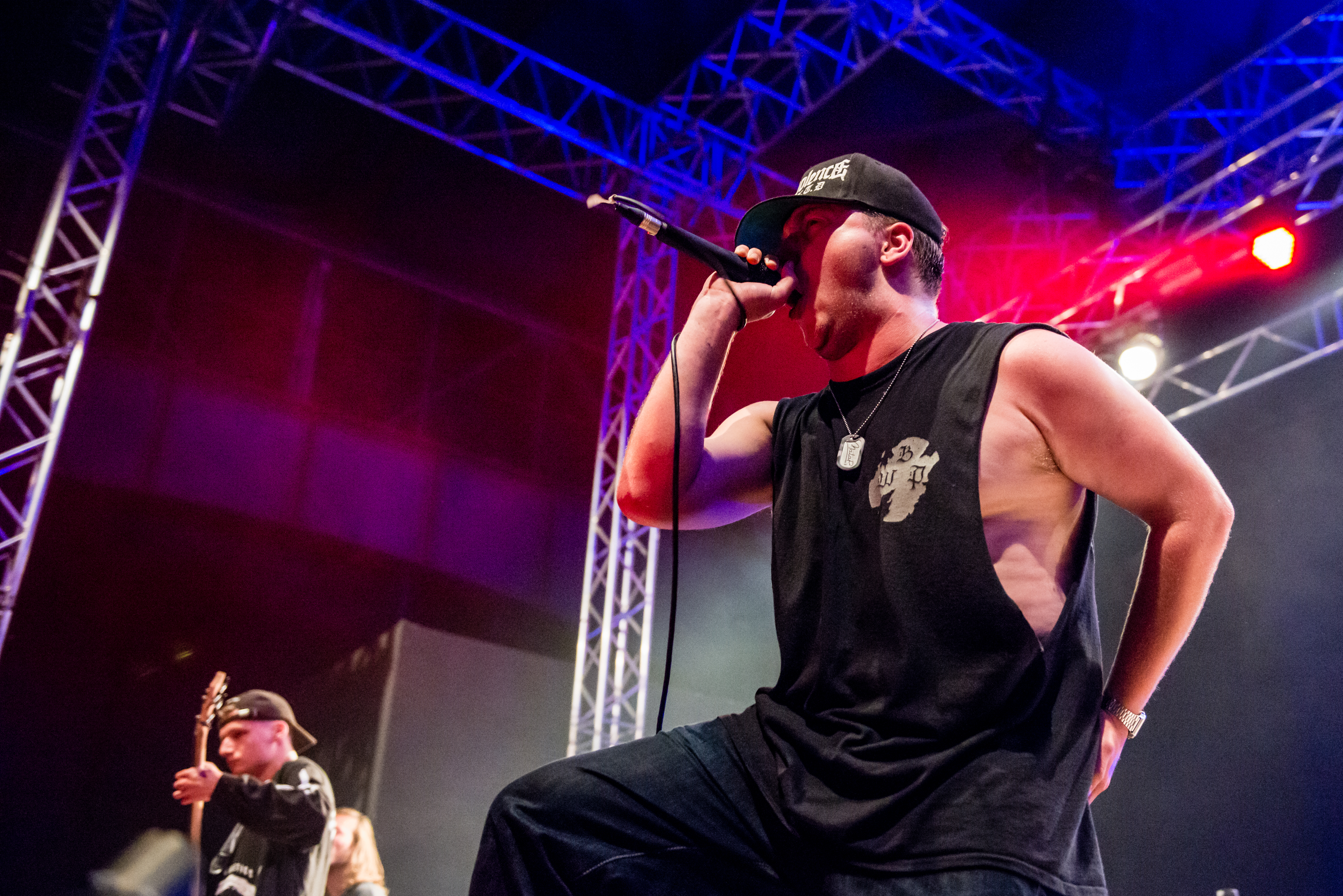 'Impericon Festival 2015; Oberhausen Turbinenhalle': 'Malevolence'